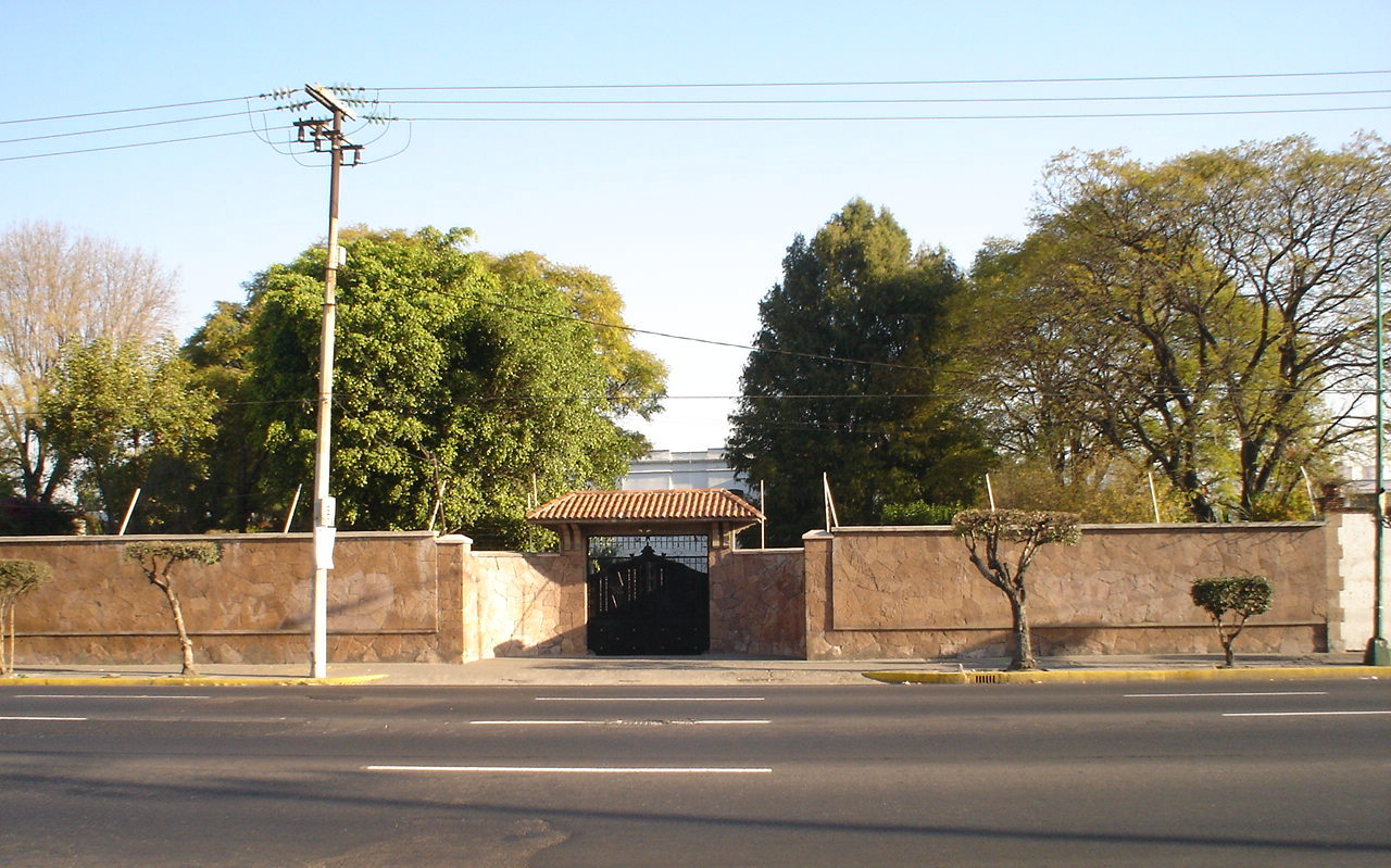 Quinta Pirineos en la colonia Lindavista de la Ciudad de México